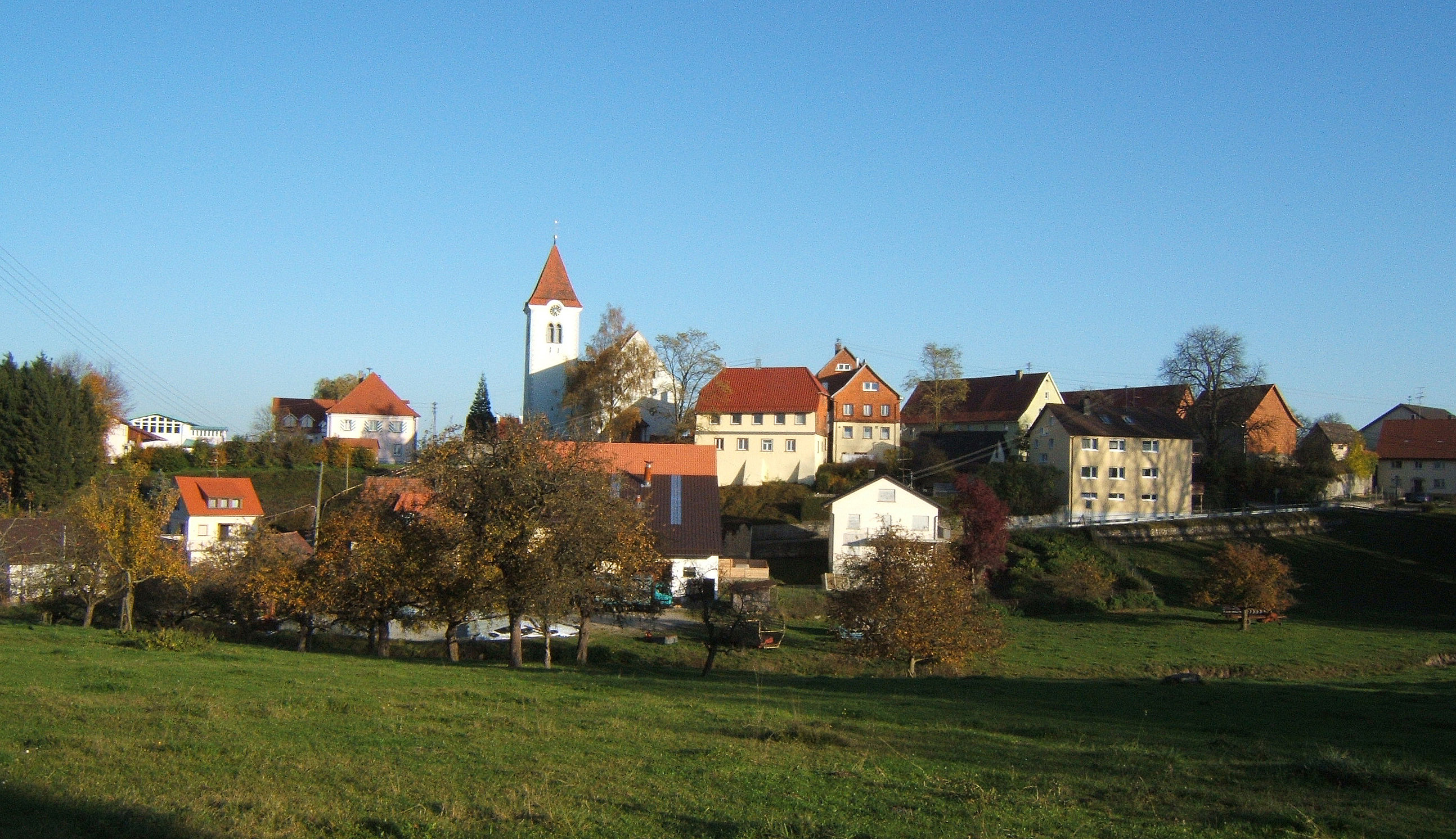 View of the village centre of Herdwangen, Baden-Wuerttemberg, Germany. Taken from the Herrengasse (West). Ansicht des Dorfkerns von Herdwangen, Baden-Wuerttemberg, Deutschland. Aufgenommen von Westen, unterhalb der Herrengasse.